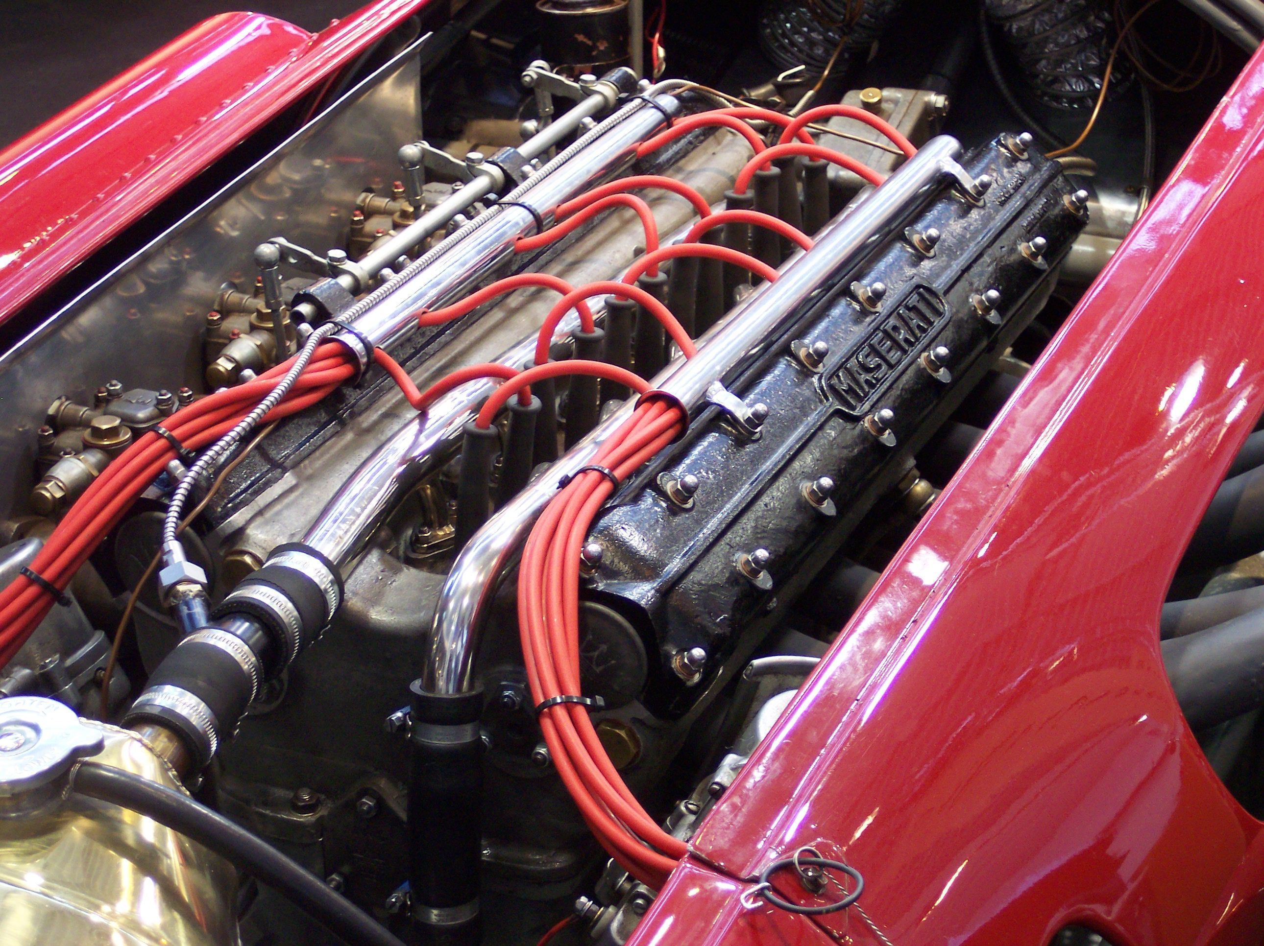 Maserati 250F's Maserati 250F engine